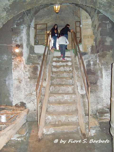 Castelvenere (BN):cantine per la conservazione del vino, scavate in un costone tufaceo.